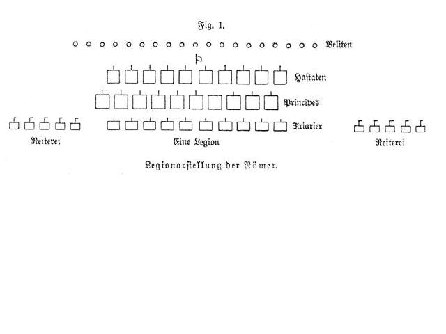 Legionarstellung der Römer aus Meyers Konversationslexikon 1888